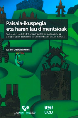 Maite Uriarteren liburuaren azala: Paisaia-ikuspegia eta haren lau dimentsioak